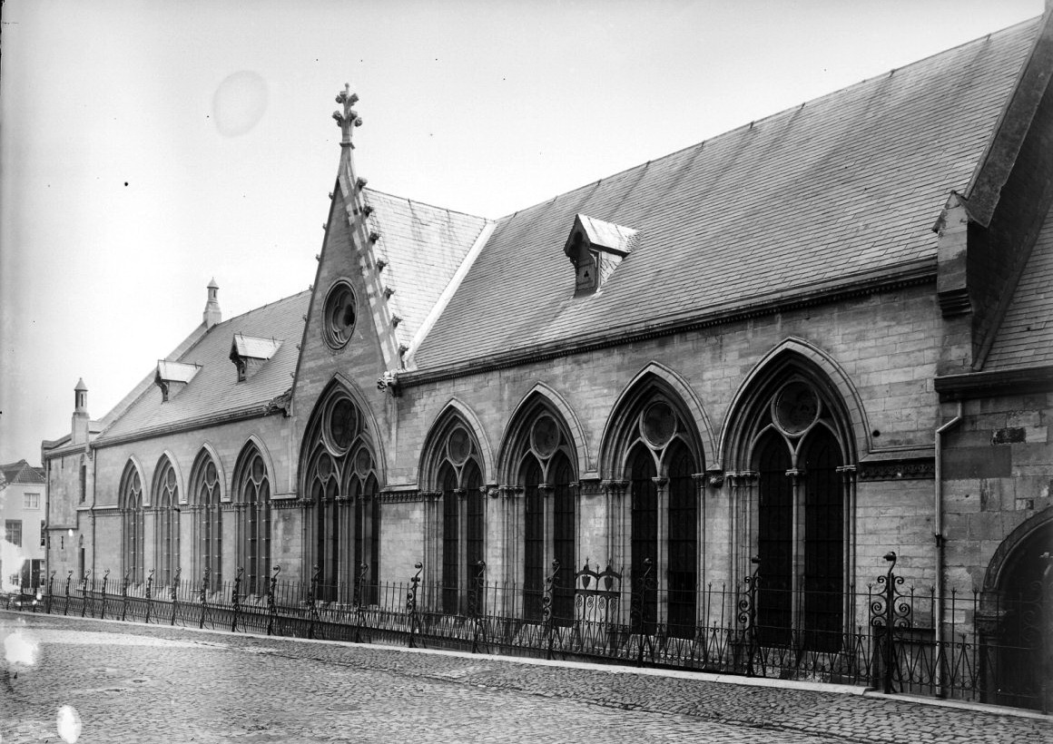 Sint-Servaaskerk: "Heiligdomskamer", de voormalige locatie van de Schatkamer in de westelijke kloostergang, gezien vanaf het Sint Servaasklooster.